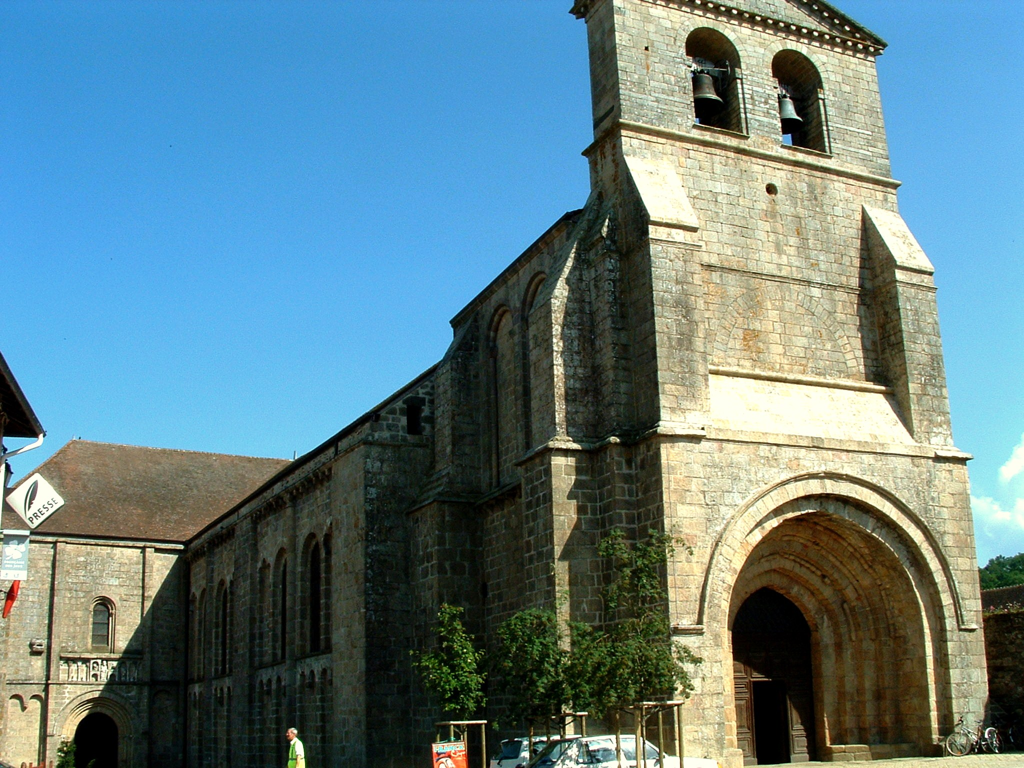 Solignac - Abbatiale - Façade occidentale